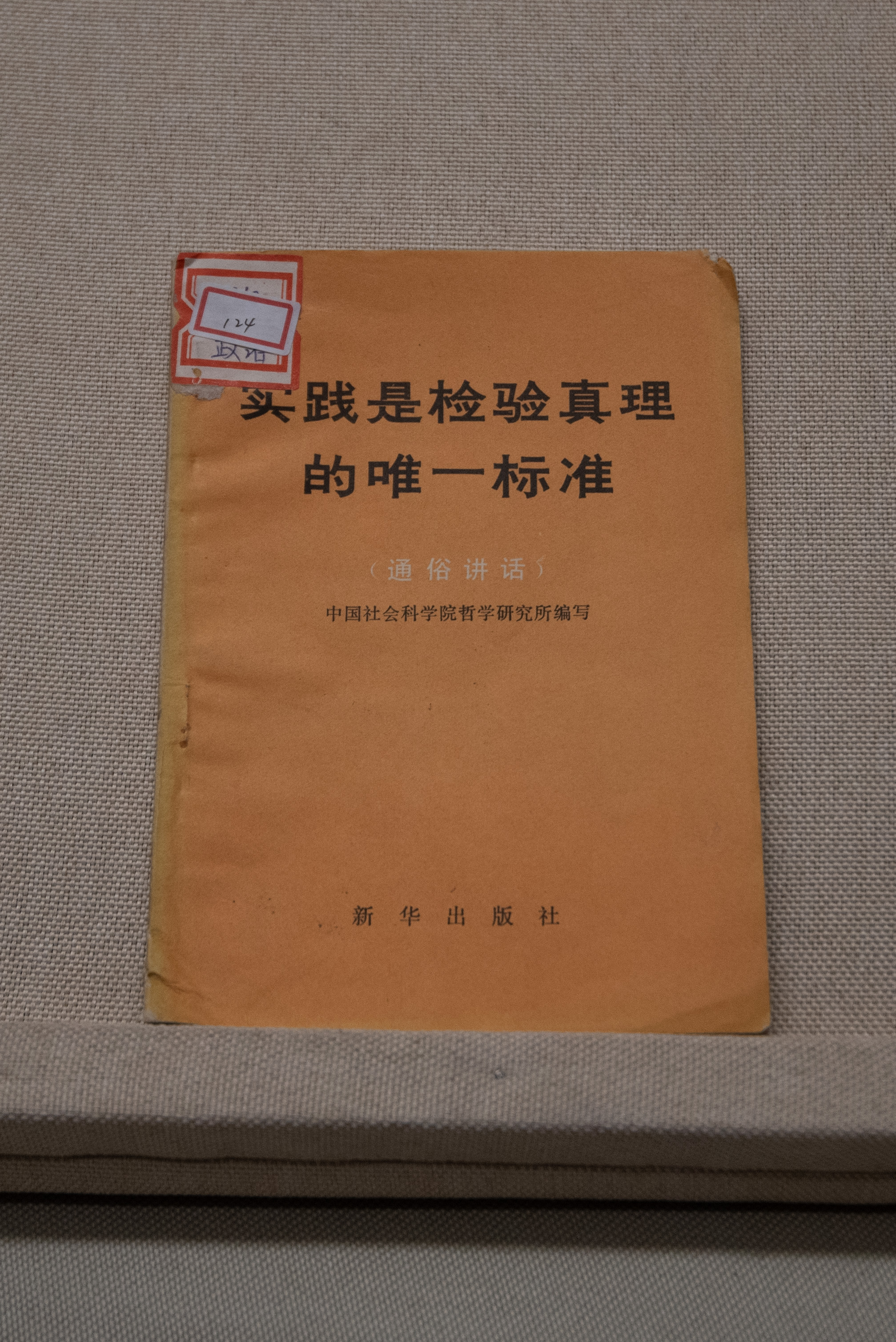 中国社会科学院哲学研究所编第一版《实践是检验真理的唯一标准》，宁波博物馆《岁月如歌》特展展出